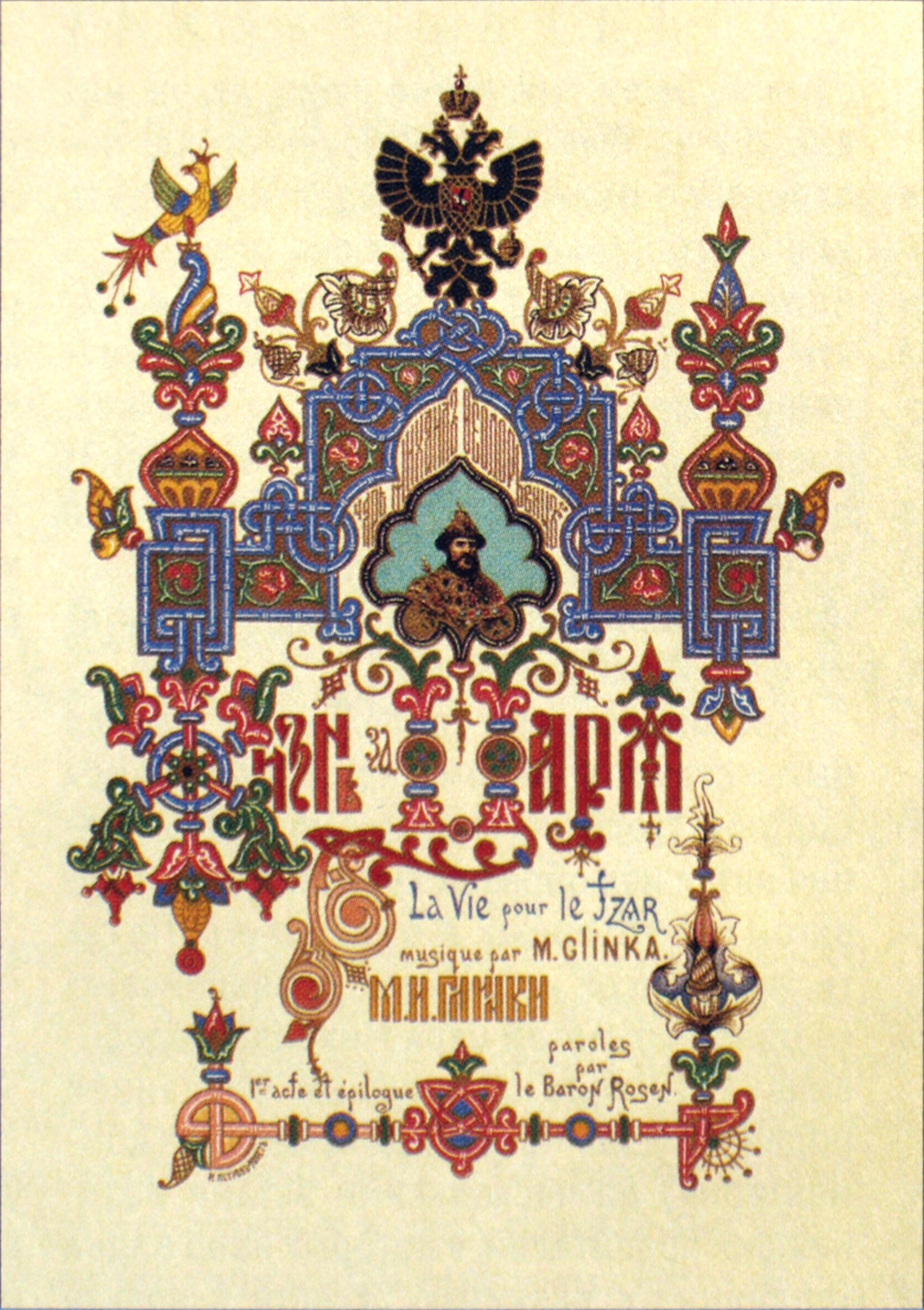 Опера Глинки "Жизнь за царя". Виньетка.